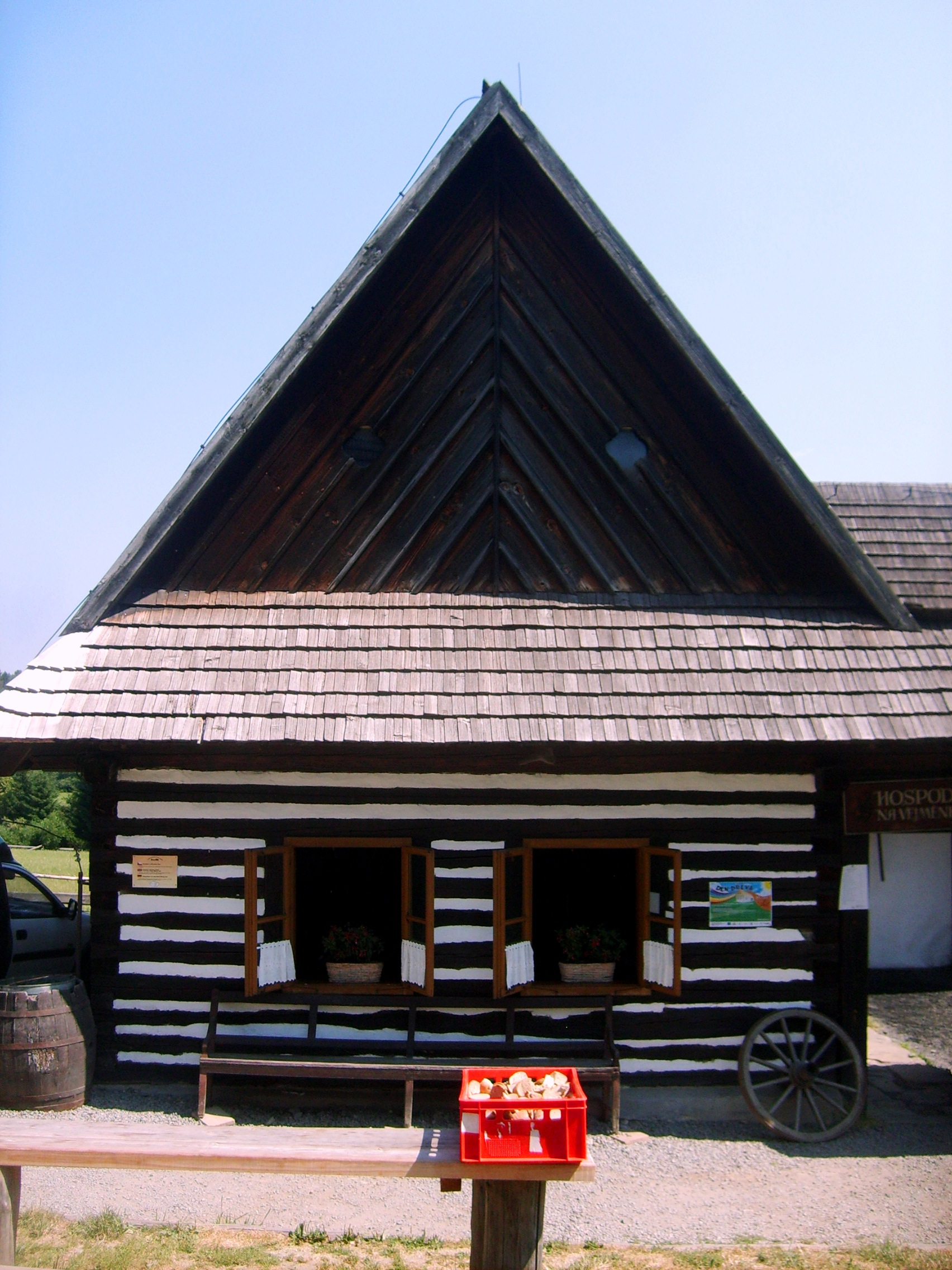 Hospoda ve skanzenu Veselý Kopec